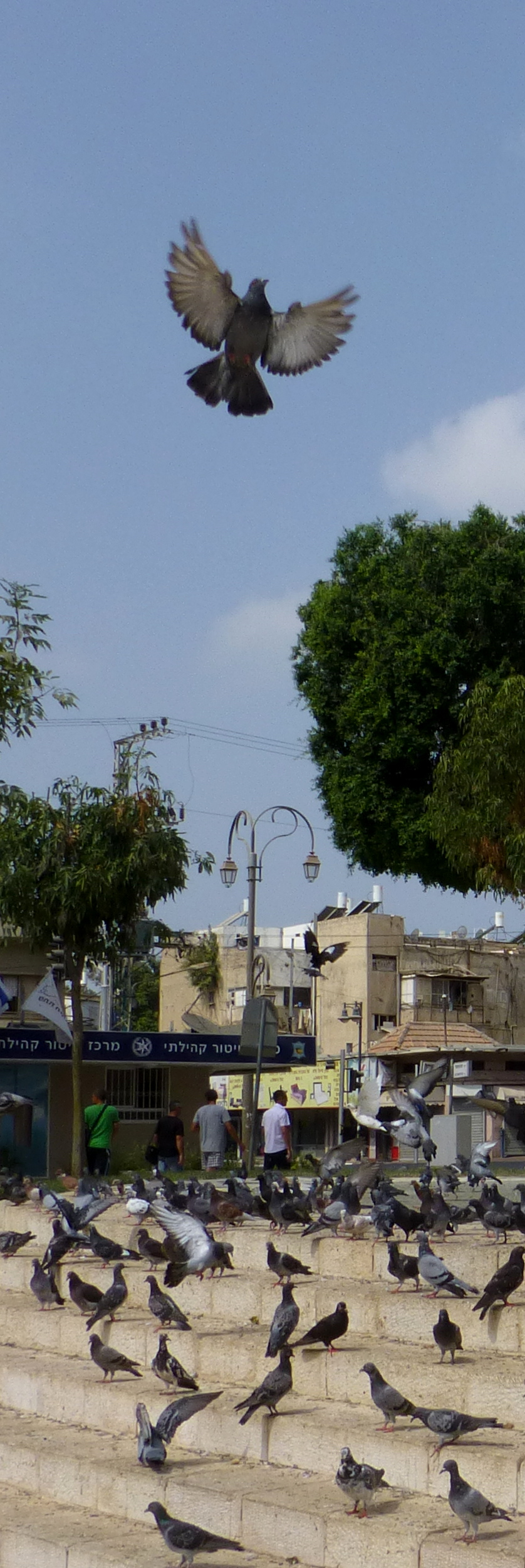 כיכר המייסדים, כיכר מרכזית בפתח תקווה, שוכנת במיקום הבתים הראשונים שנבנו בפתח תקווה בשנת 1878. כבר בימי העלייה השנייה שימשה כמקום מפגש ובילויים.